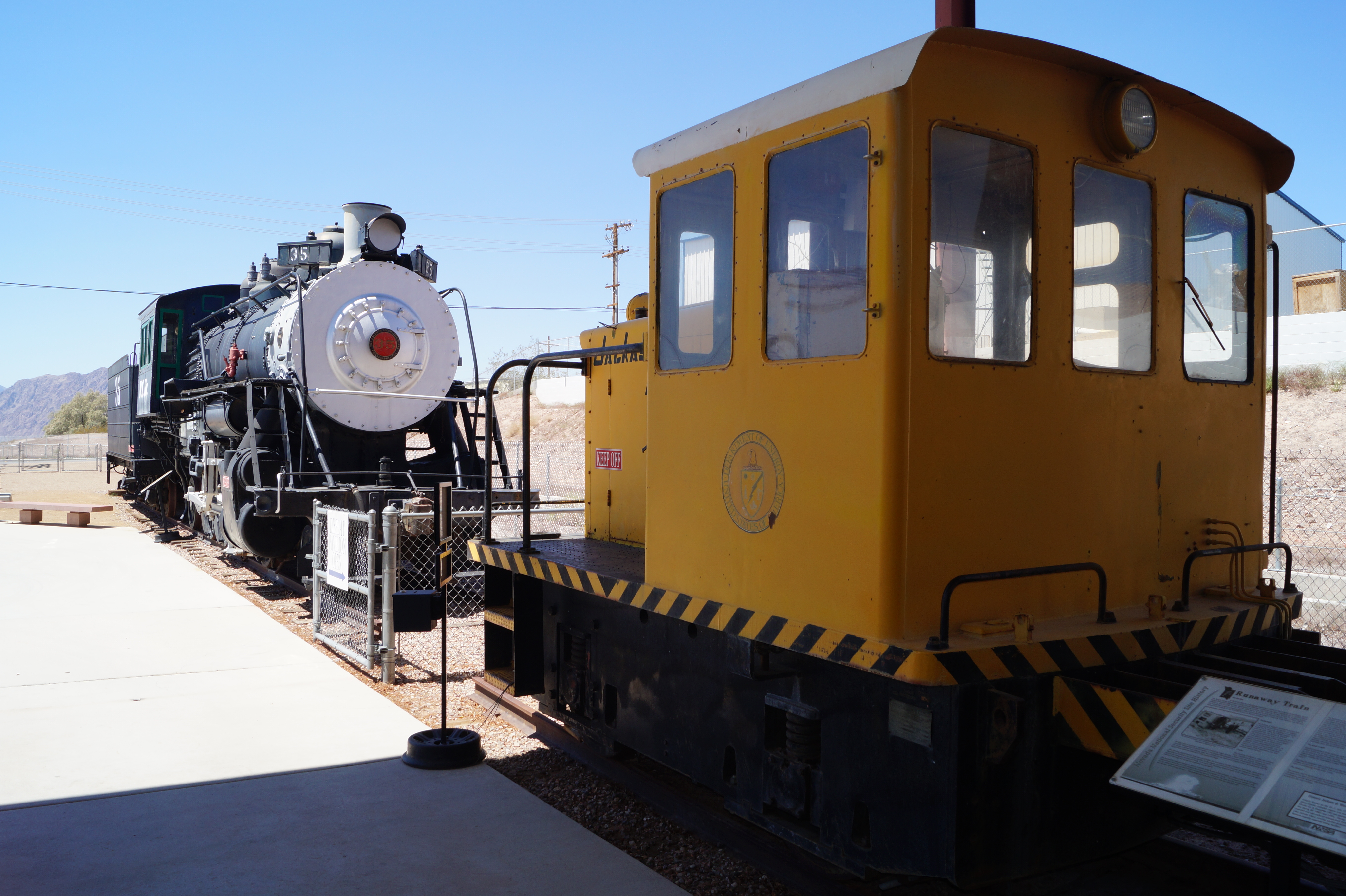 The Nevada State Railroad Museum which is an agency of the Nevada Department of Cultural Affairs. It is located at Yucca Street on the tracks of the historic Union Pacific Railroad branch Henderson-Boulder City near the former Boulder City Railroad Yards where the Hoover Dam construction equipment was unloaded in the 1930s.